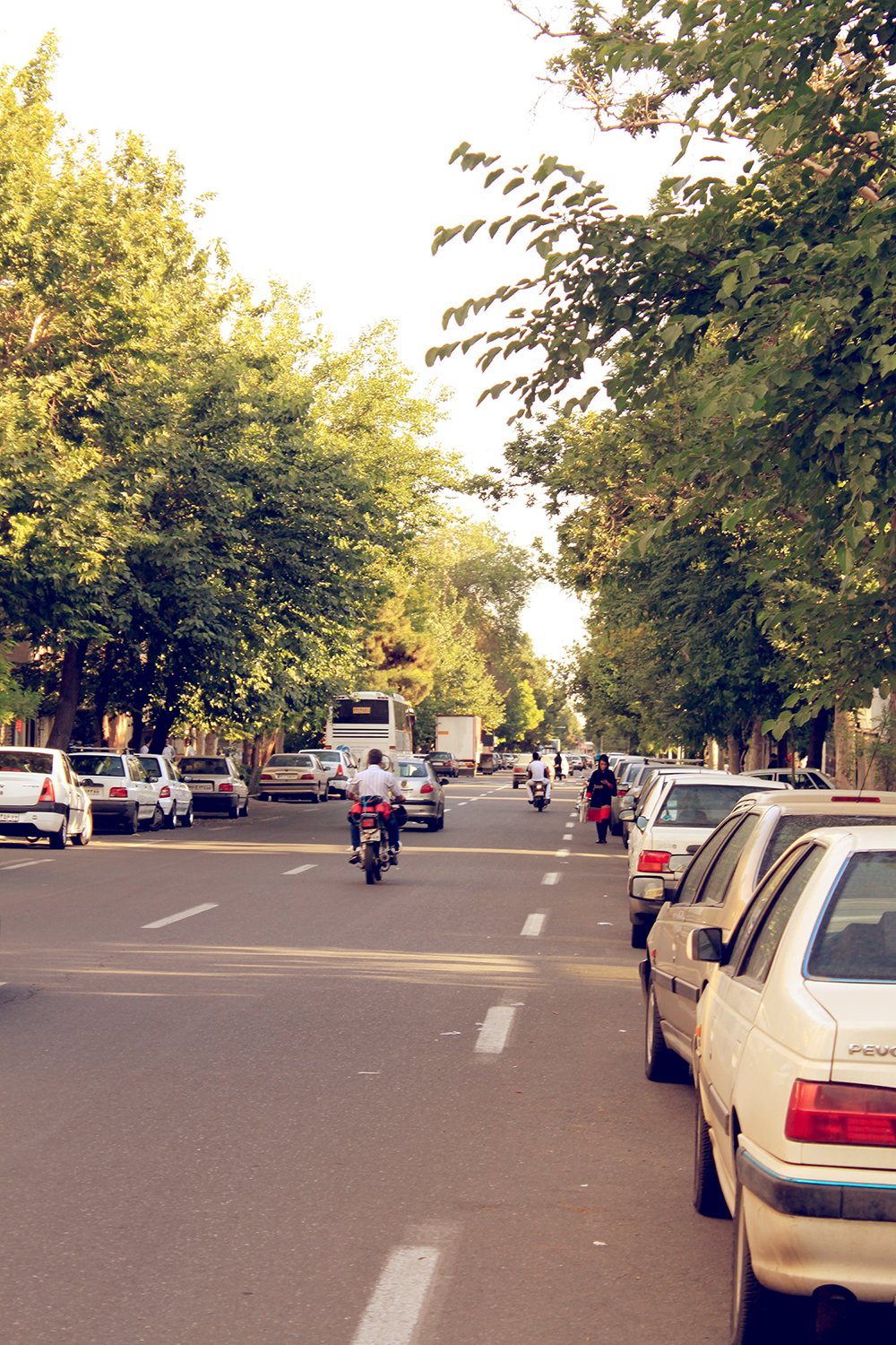 خيابان سامان، پایین‌تر از خيابان گلبرگ